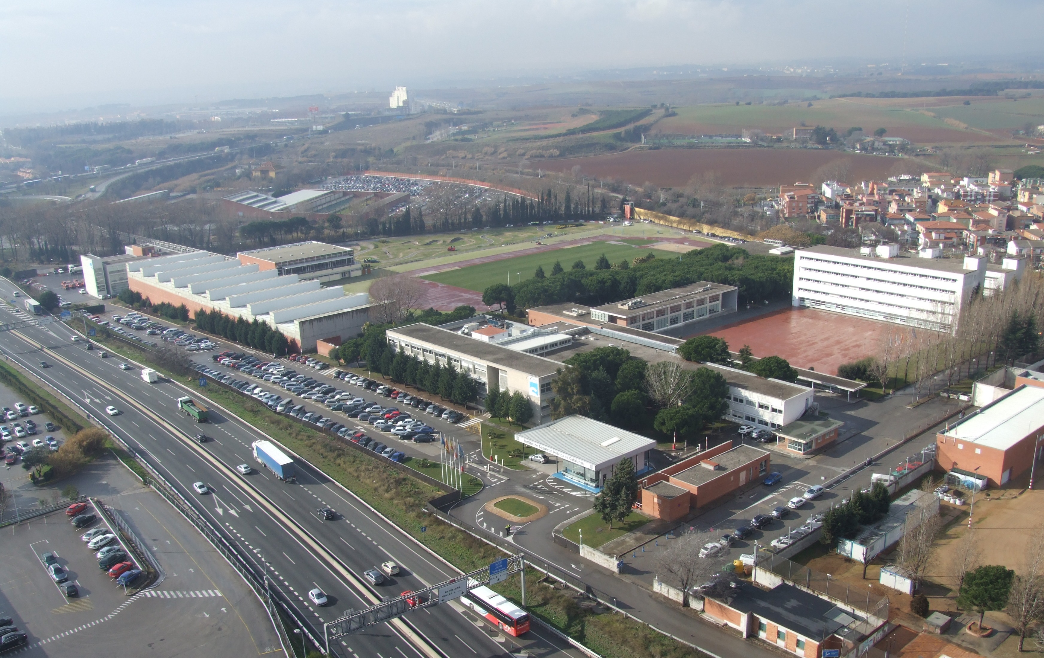 Vista aèria del recinte de l'ISPC